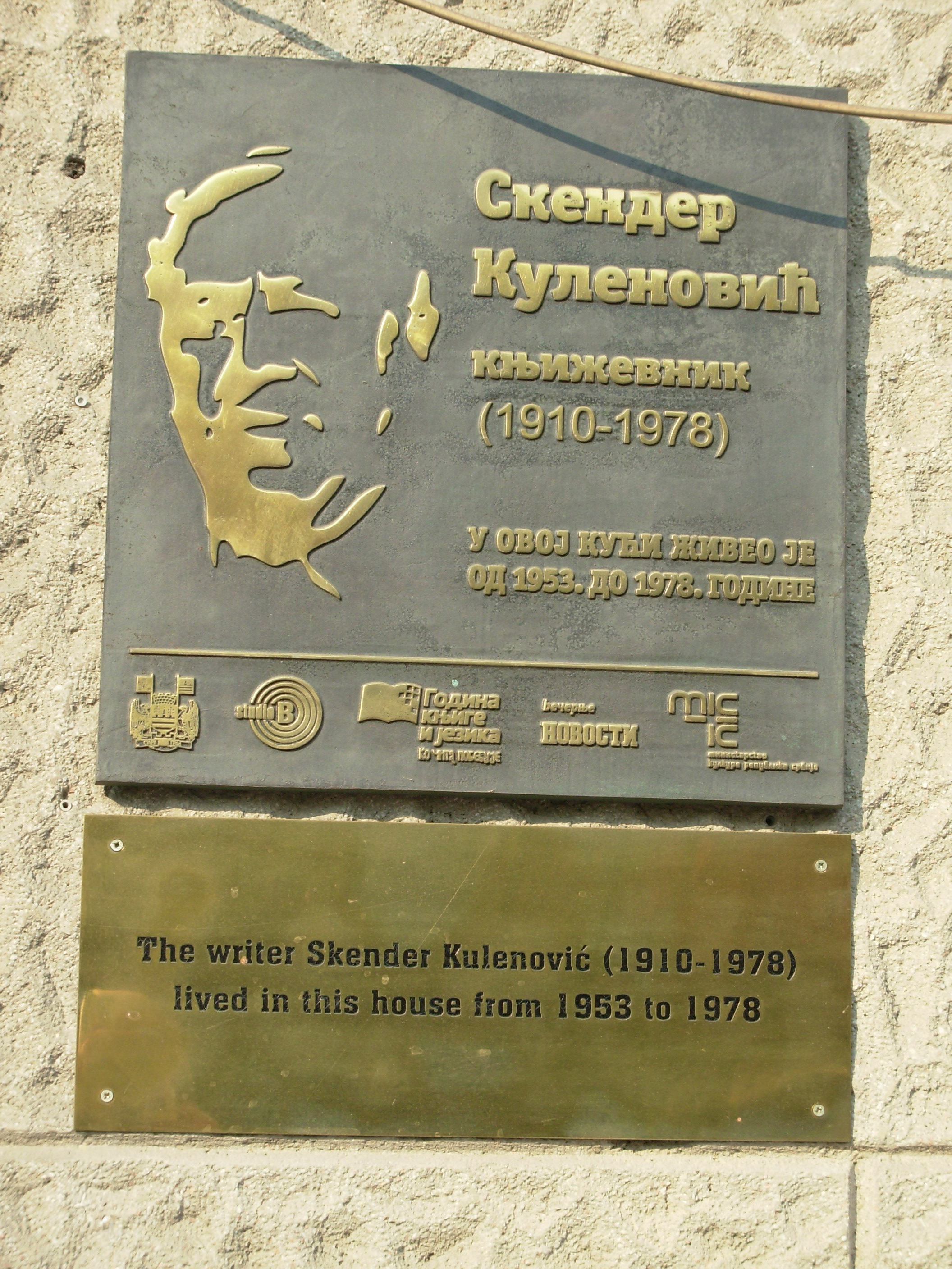 Tabla u Vlajkovićevoj ulici na zgradi gde je živeo Skender Kulenović. Slikao Goldfinger.